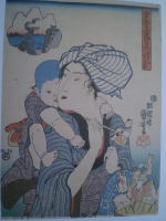 「江戸じまん 今戸のやきもの」歌川国芳 画 今戸焼 吉徳資料室蔵